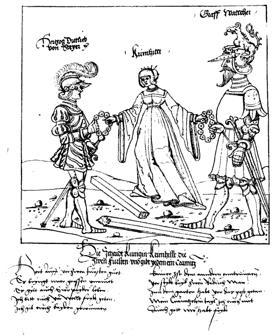 Berliner Rosengartenspiel SB Berlin mgf 800, Bl. 2v: Kriemhild überreicht Dietleib und Walther je einen Rosenkranz